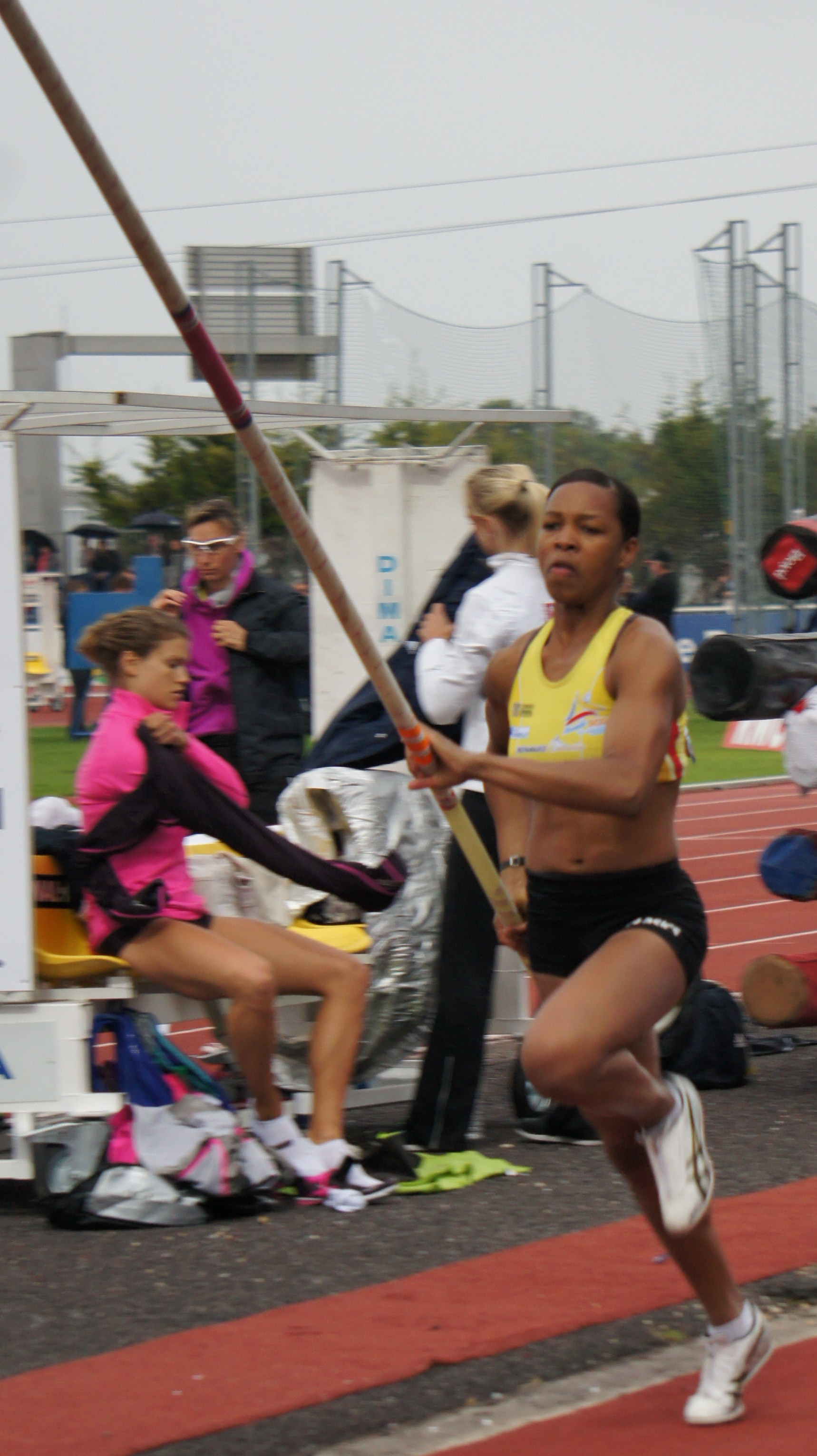 Maria Leonor Tavares lors des Rencontres d'athlétisme de Reims 2013, avec au second plan Marion Lotout, Mary Saxer et Vanessa Boslak.